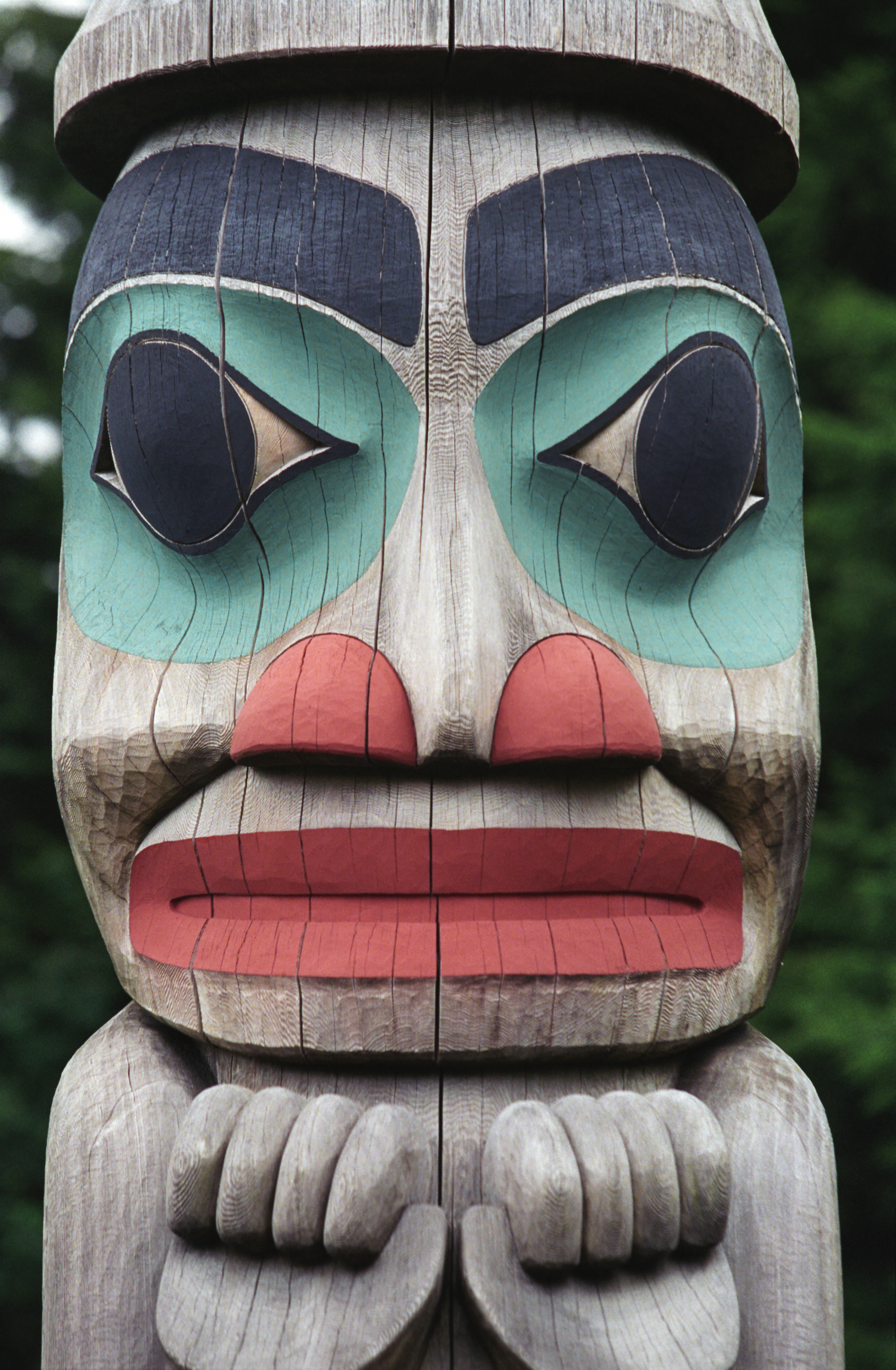 Totem pole, Saxman Totem Park